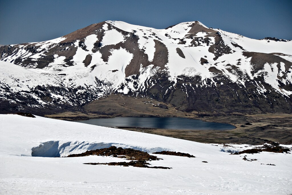 Laguna Trolope desde Copahue